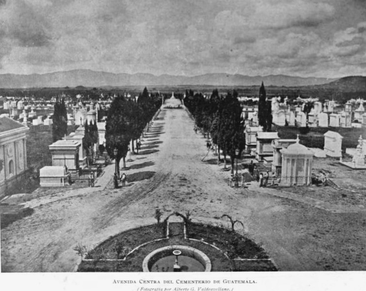 Cementerio General de la Ciudad de Guatemala en 1896.